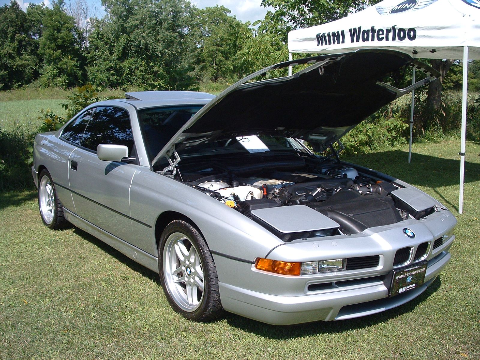 Silver BMW E31 8 series coupéDSCF0003